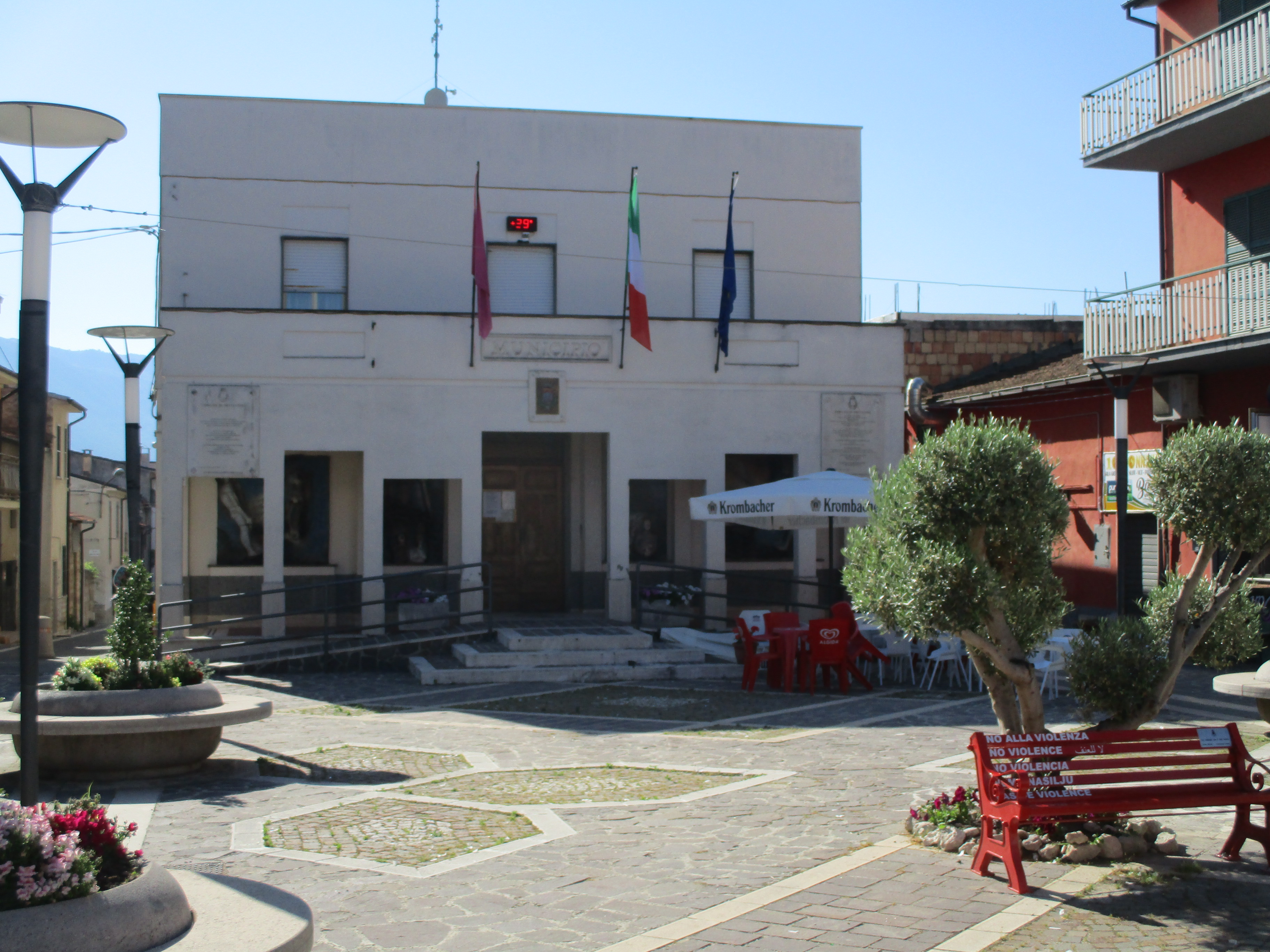 Municipio di Ortucchio